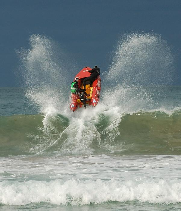 Canot gonflable IRB franchissant une vague déferlante.